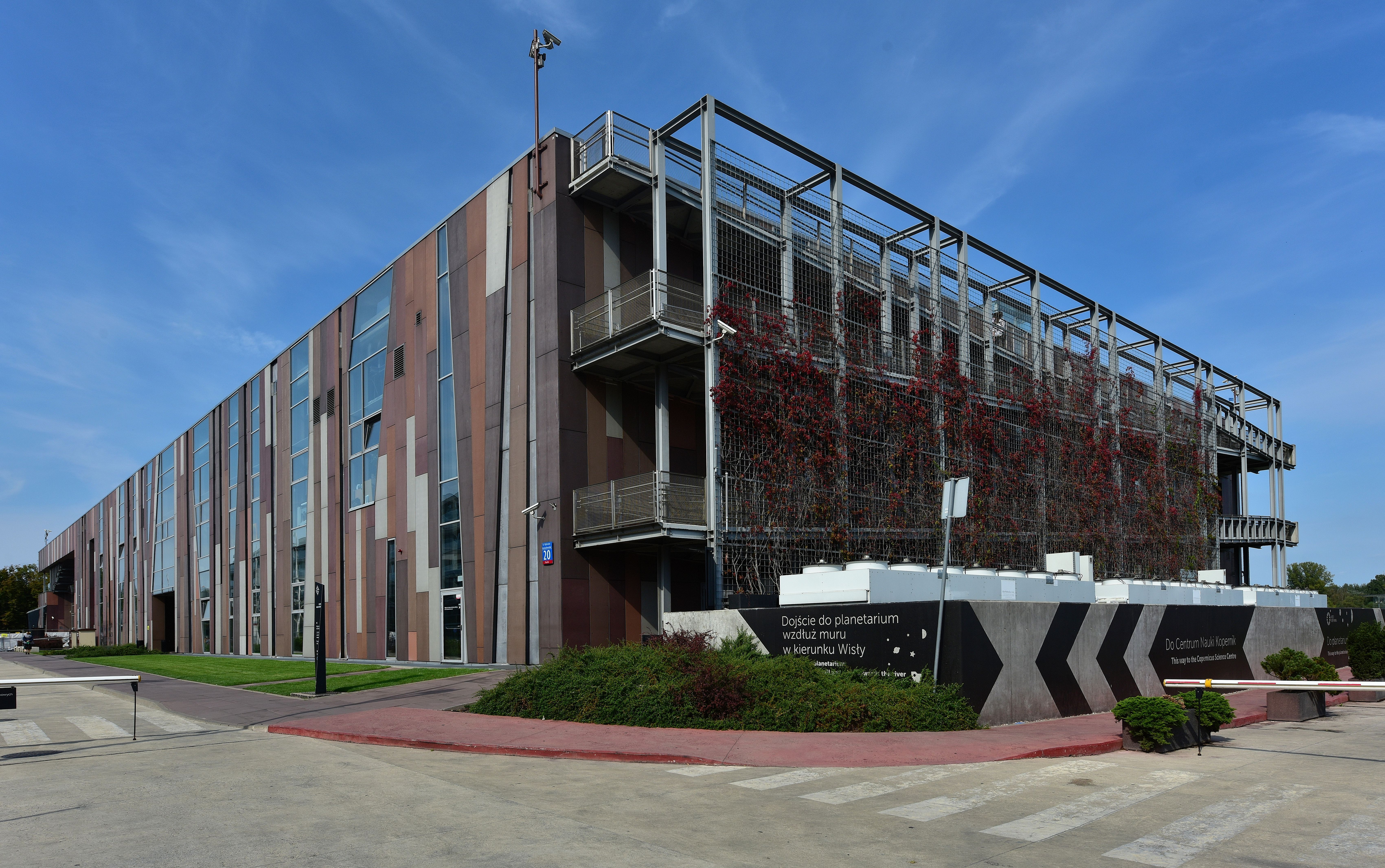 Centrum Nauki Kopernik w Warszawie